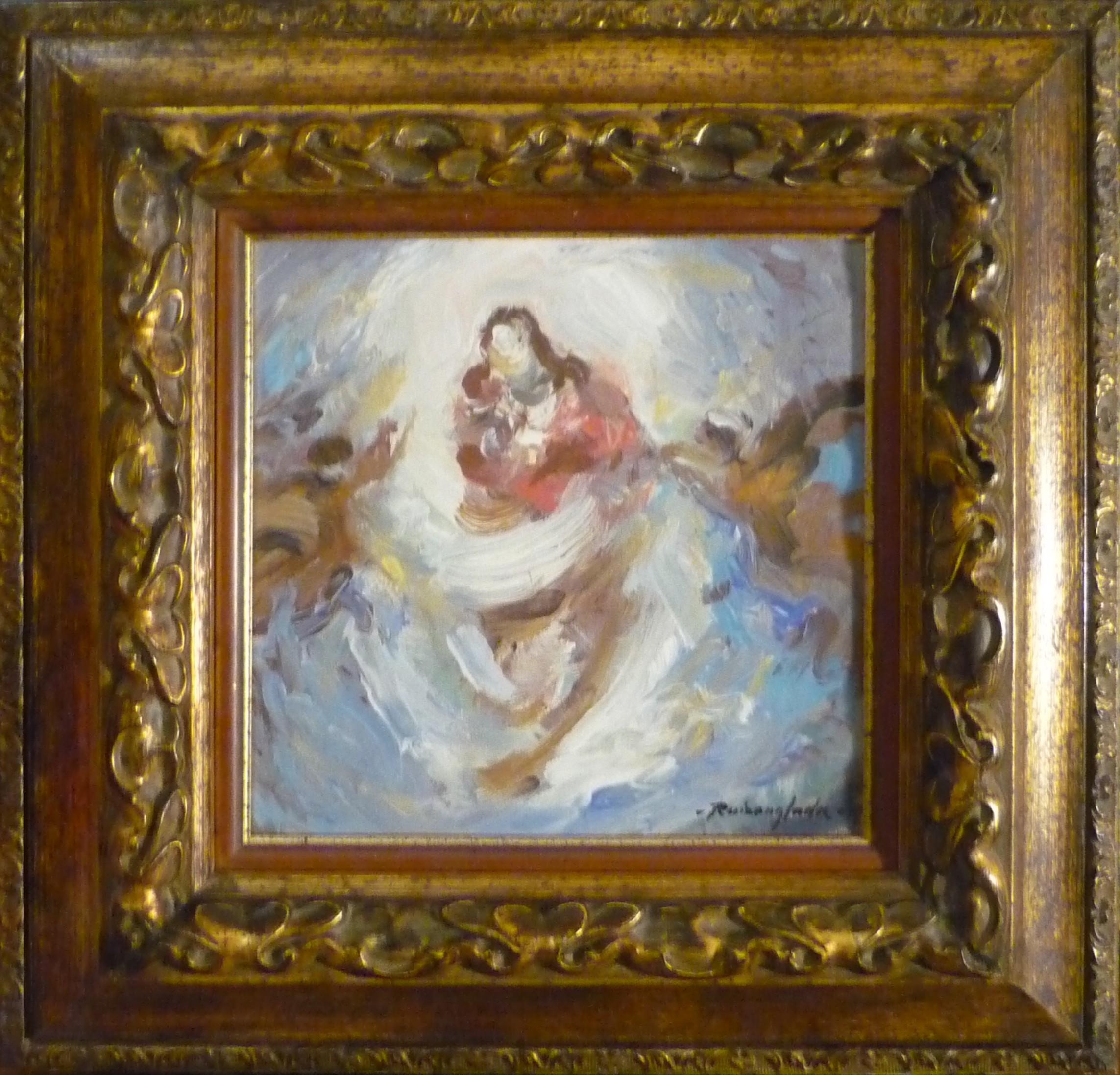 Ruizanglada - Virgen 29x28